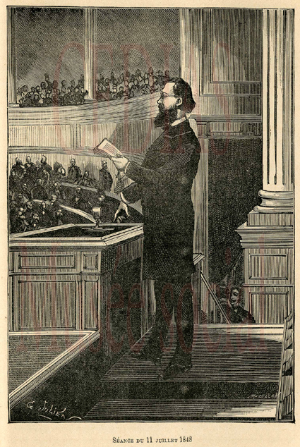 In : Histoire du socialisme depuis les temps les plus reculés jusqu'à nos jours, ou Efforts des réformateurs et des révoltés à travers les âges, 2. Histoire du socialisme en France depuis la Révolution française jusqu'en 1878 / Benoît Malon / Paris : Derveaux (1883).